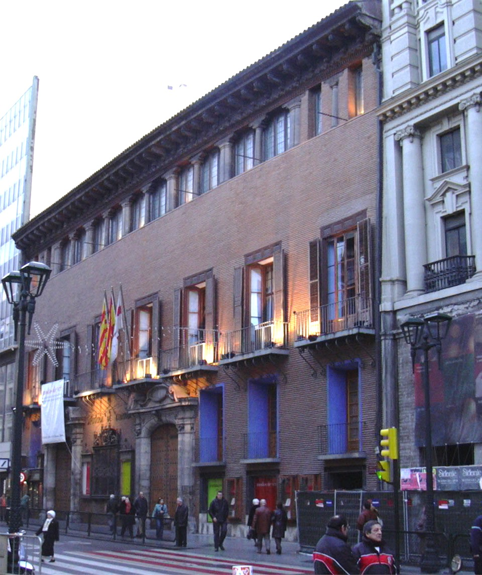 Zaragoza - Casa palacio de los Condes de Sástago. Casa palacio aragonés de entre 1570 a 1574